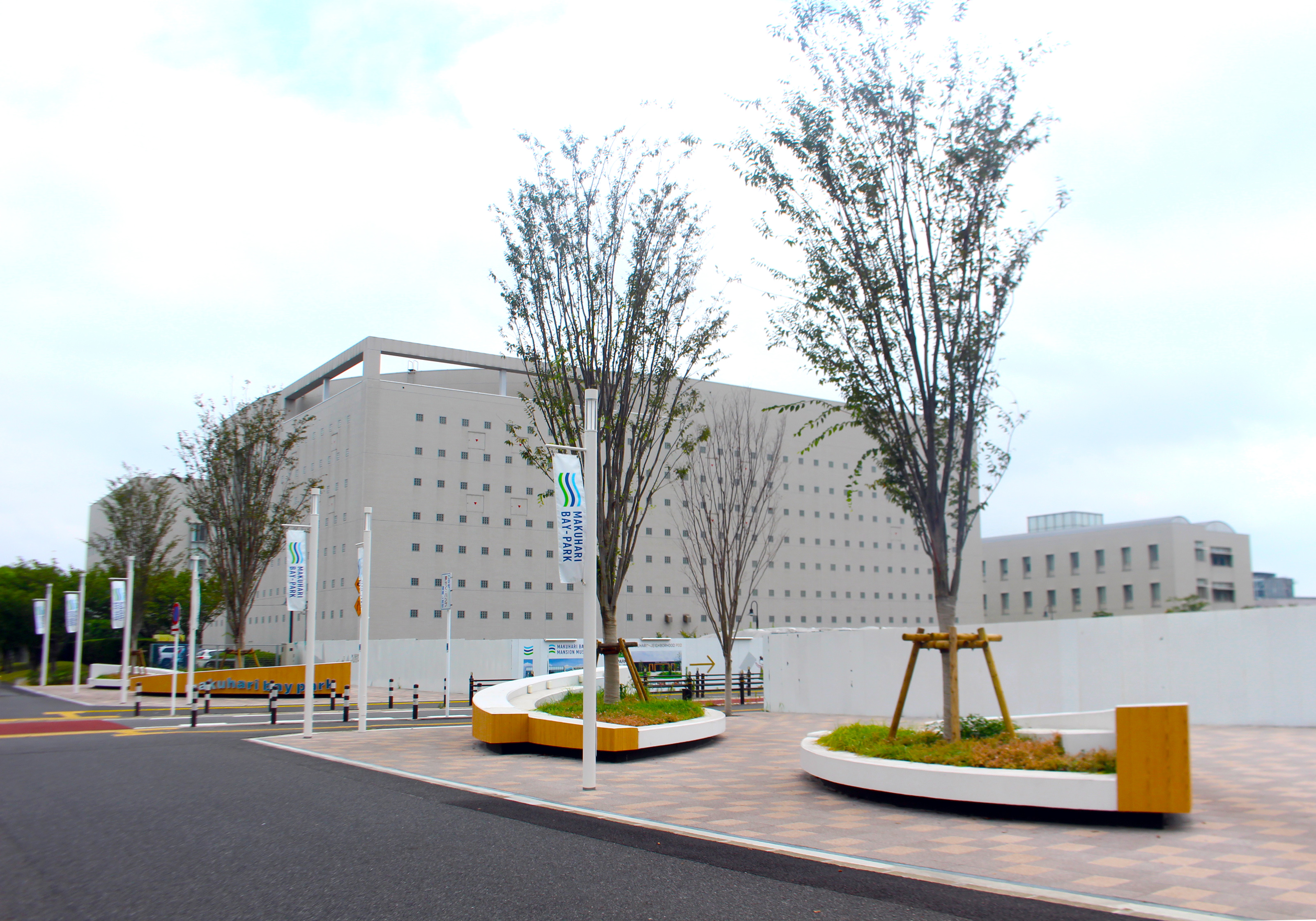 Makuhari Bay Park Entrance 幕張ベイパーク入口（幕張海浜公園側より）